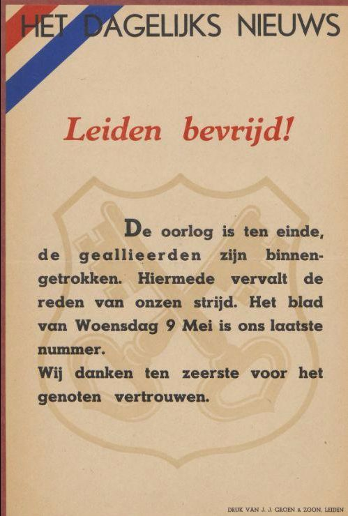 Pagina uit het laatste nummer van de verzetskrant Het Dagelijks Nieuws, 9 mei 1945.